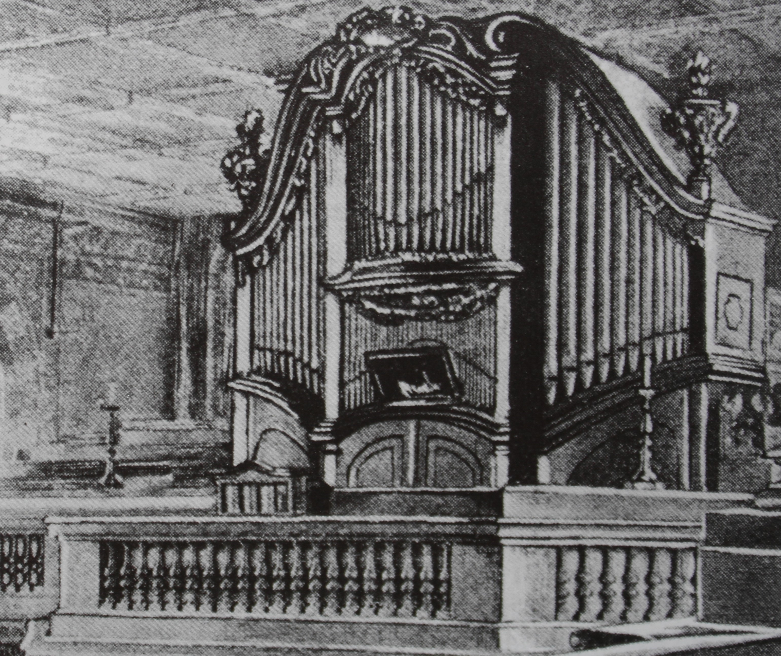 Foto der Scheibe-Orgel in der Johanniskirche Leipzig, Sachsen, Deutschland